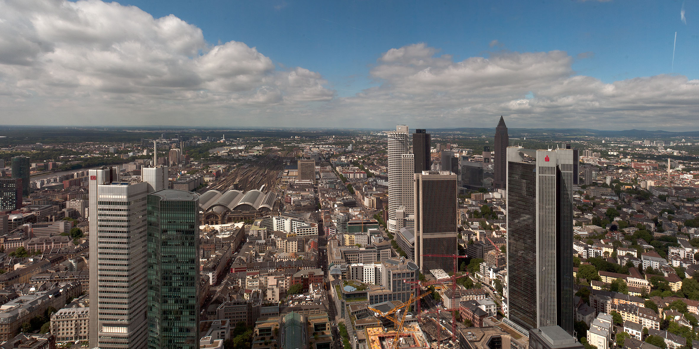 Frankfurt am Main, westliches Zentrum mit Hauptbahnhof, vom Main Tower aus gesehen